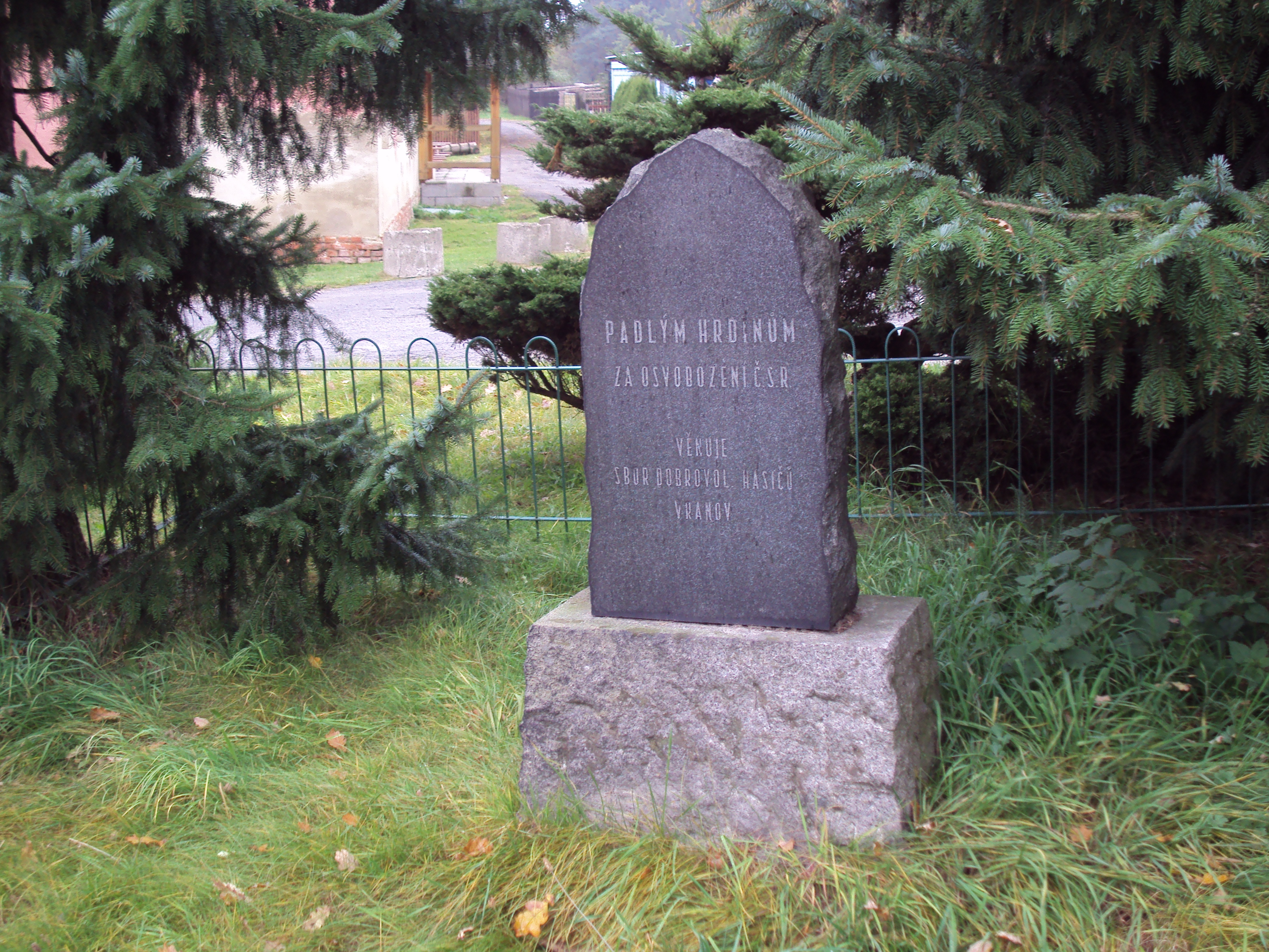 Památník padlých ve válkách